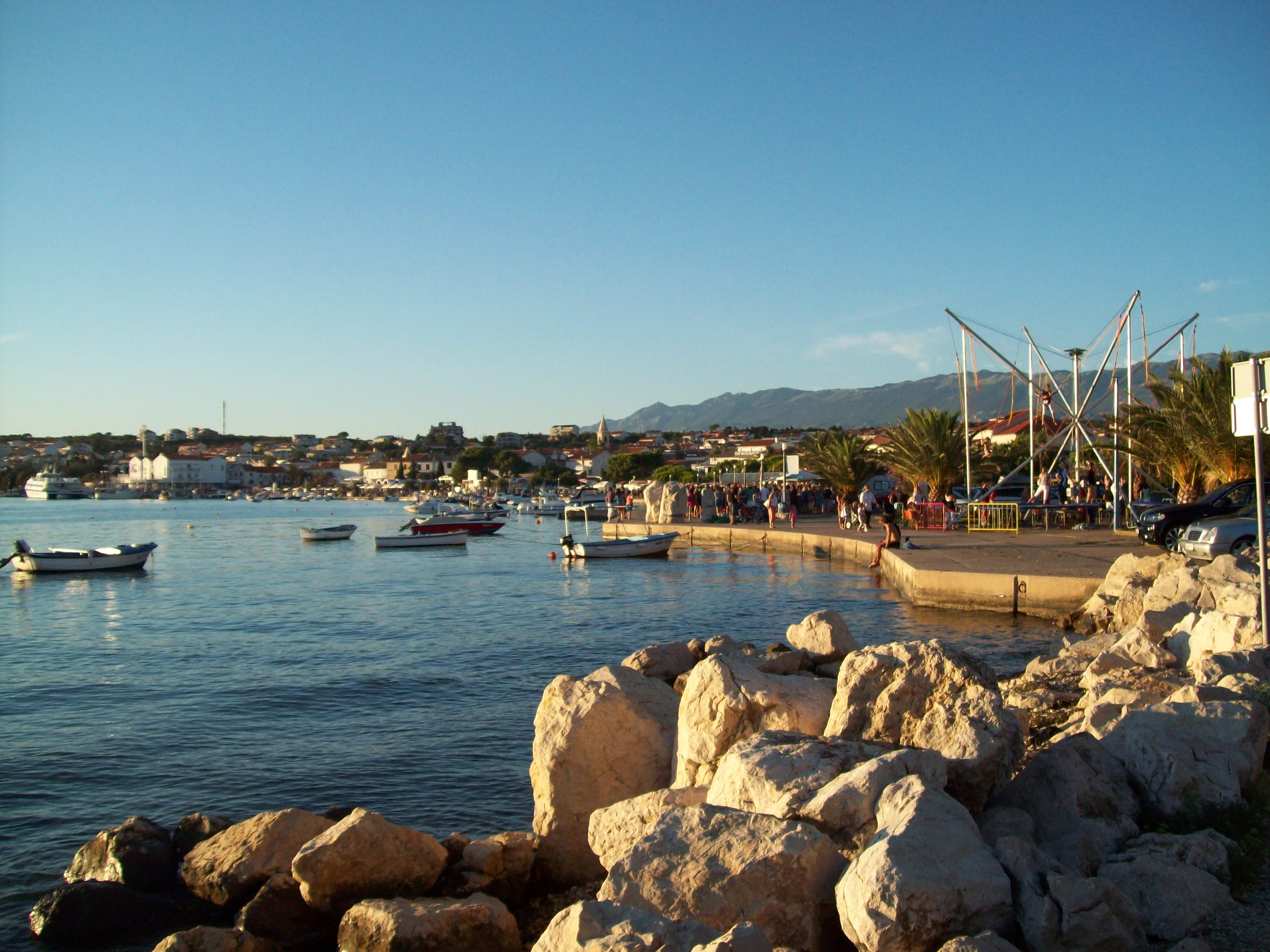 Die Stadt Novalja von der Marina aus.